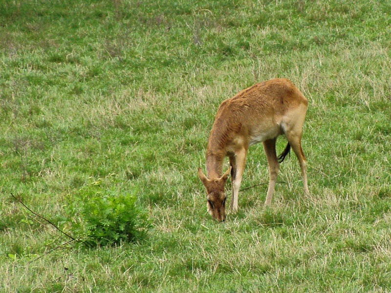 Kobus megaceros - female (Prague Zoo)